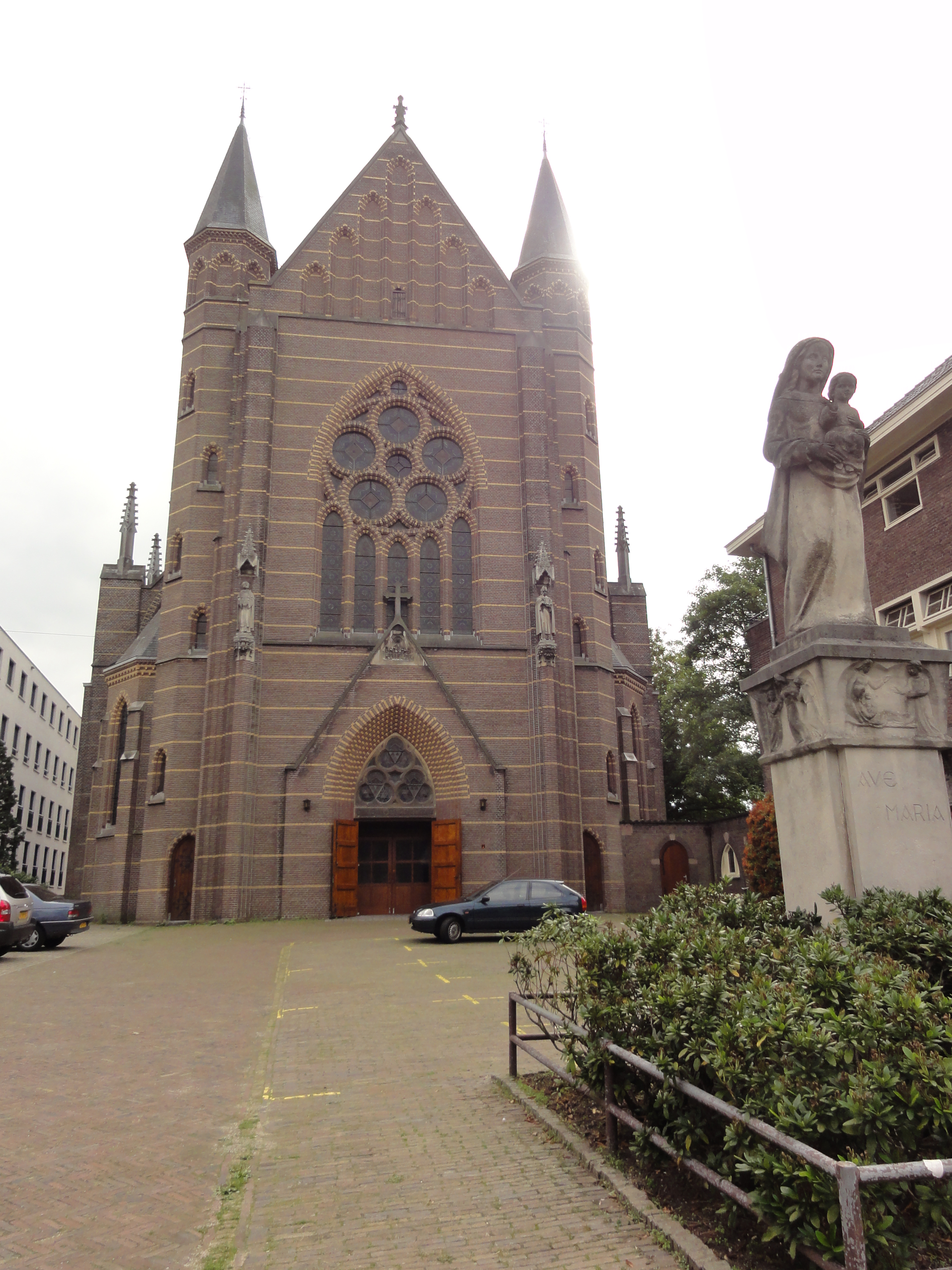 Nijmegen rijksmonument 522947 kerk, Berg en Dalseweg 42